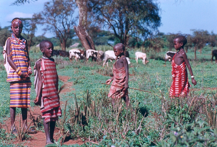 Photos d'enfants Masai, Lieu : Parc national Amboseli, Kenya Mois et Année : Décembre 1990 Copyright : Georgio